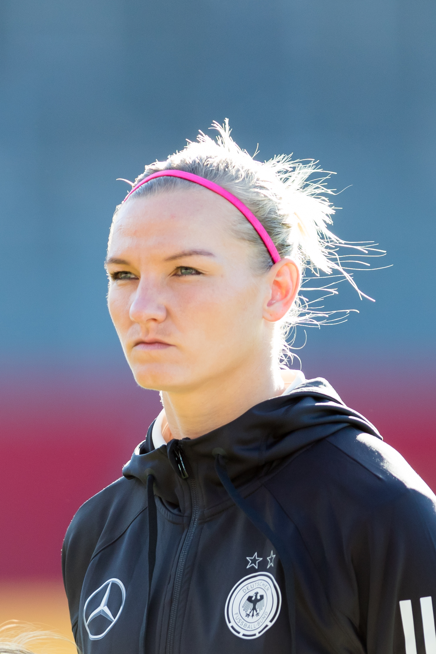 during Fussball Frauen Deutschland vs Island at Brita-Arena, Wiesbaden, Hessen, Germany on 2017-10-20, Photo: Sven Mandel